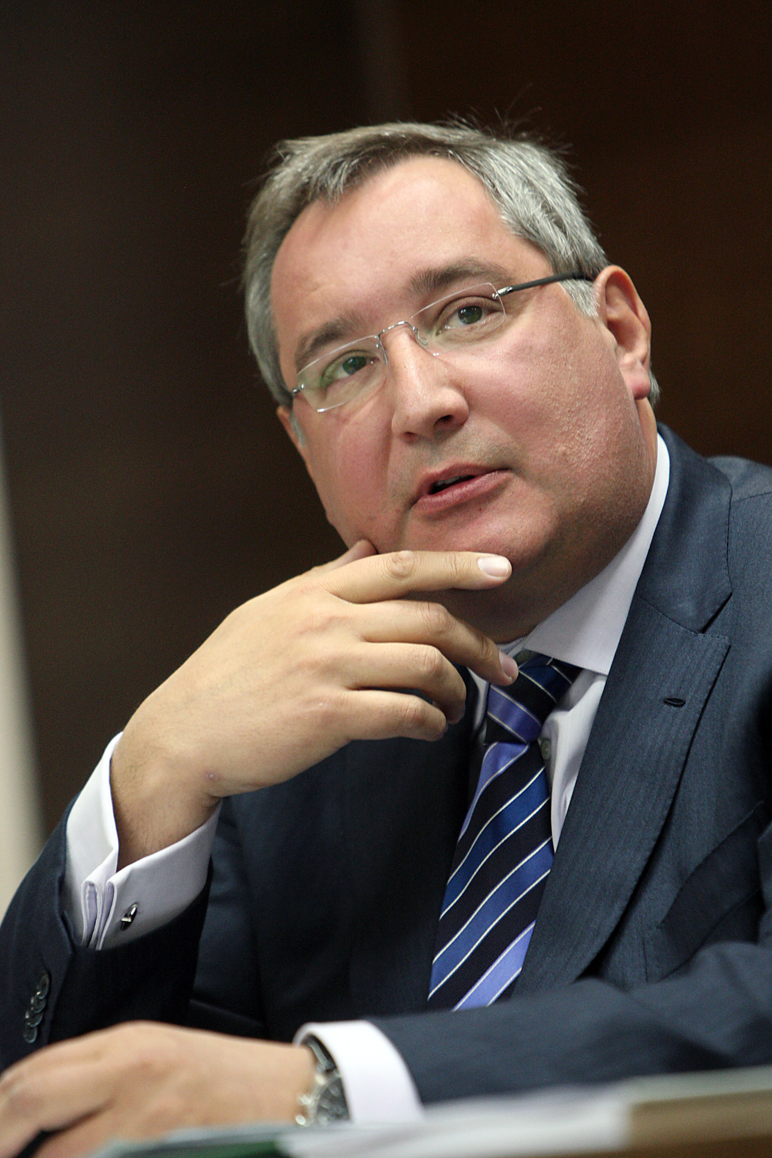 Заместитель Председателя Правительства Российской Федерации